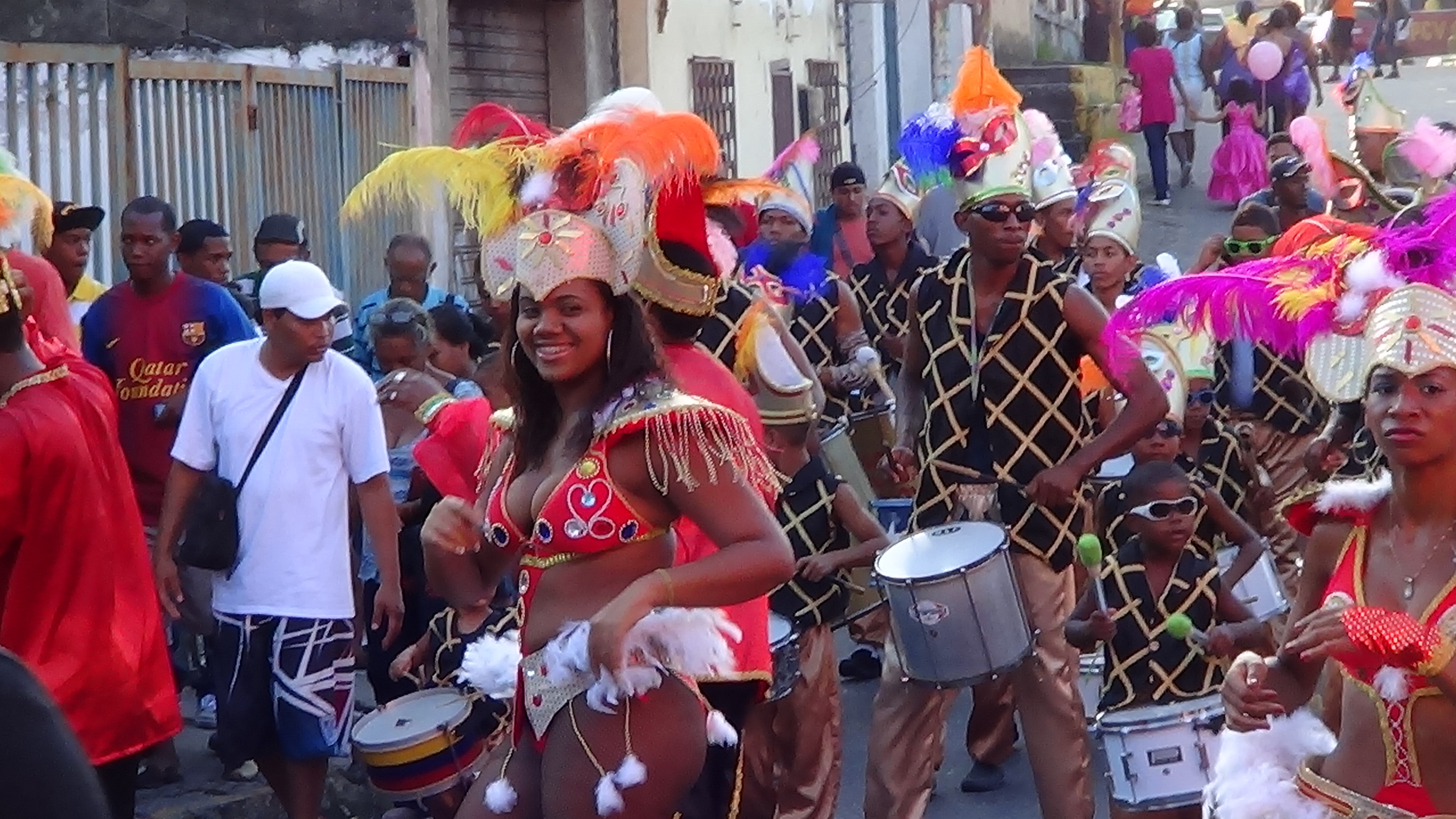 Los Carnavales en Tacarigua de Brión